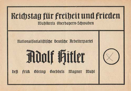 Wahlzettel aus dem 3. Reich (wohl zur Reichstagswahl 1936)